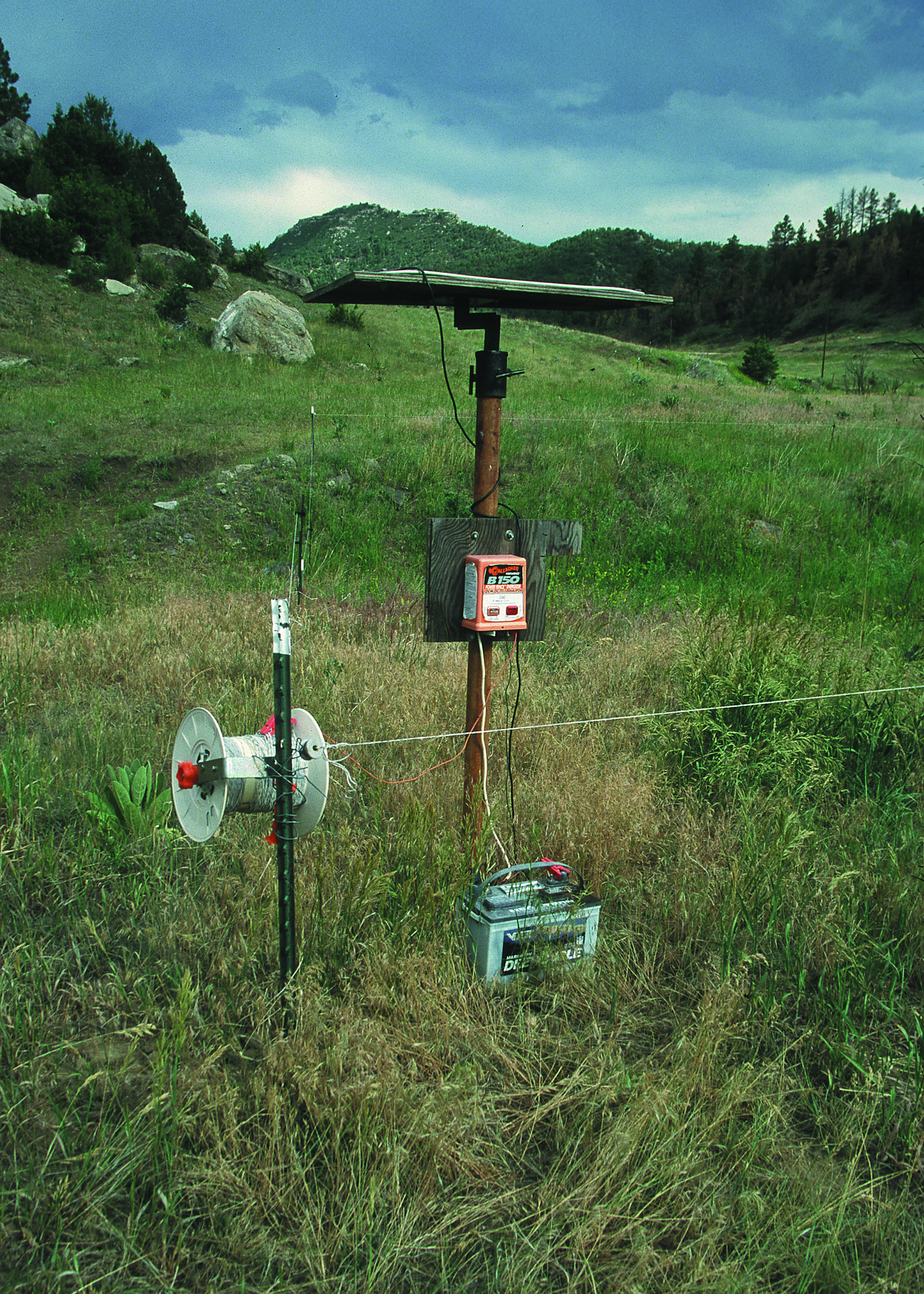 Electric Fence Energizer